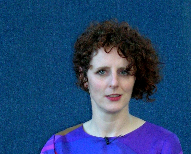 Maggie O'Farrell